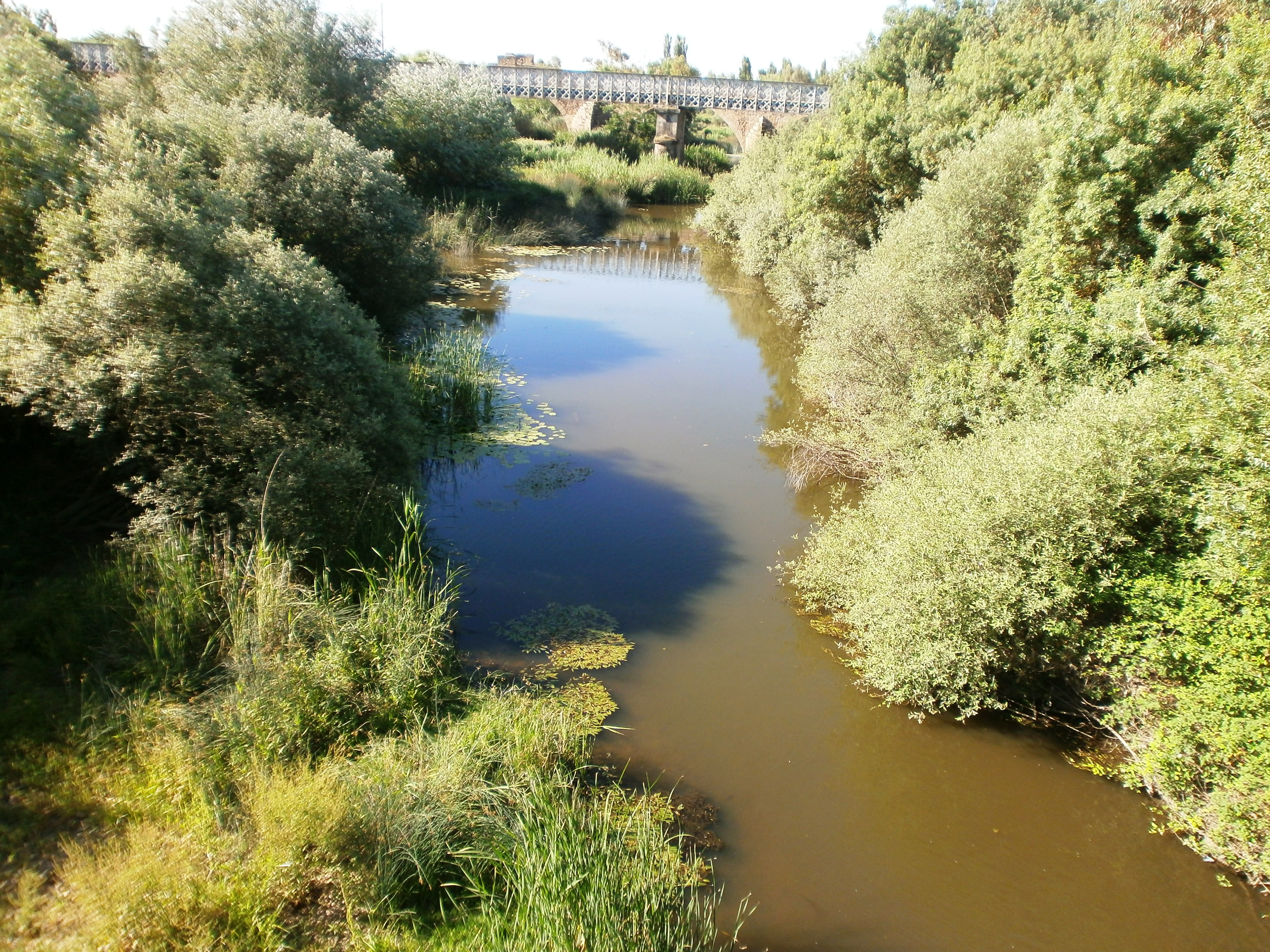 Río Gevora Bajo, afluente del Guadiana por la derecha, muy poco antes de su desembocadura. This is a photography of a Special Area of Conservation in Spain with the ID: ES4310059. Natura2000 entry, EEA entry